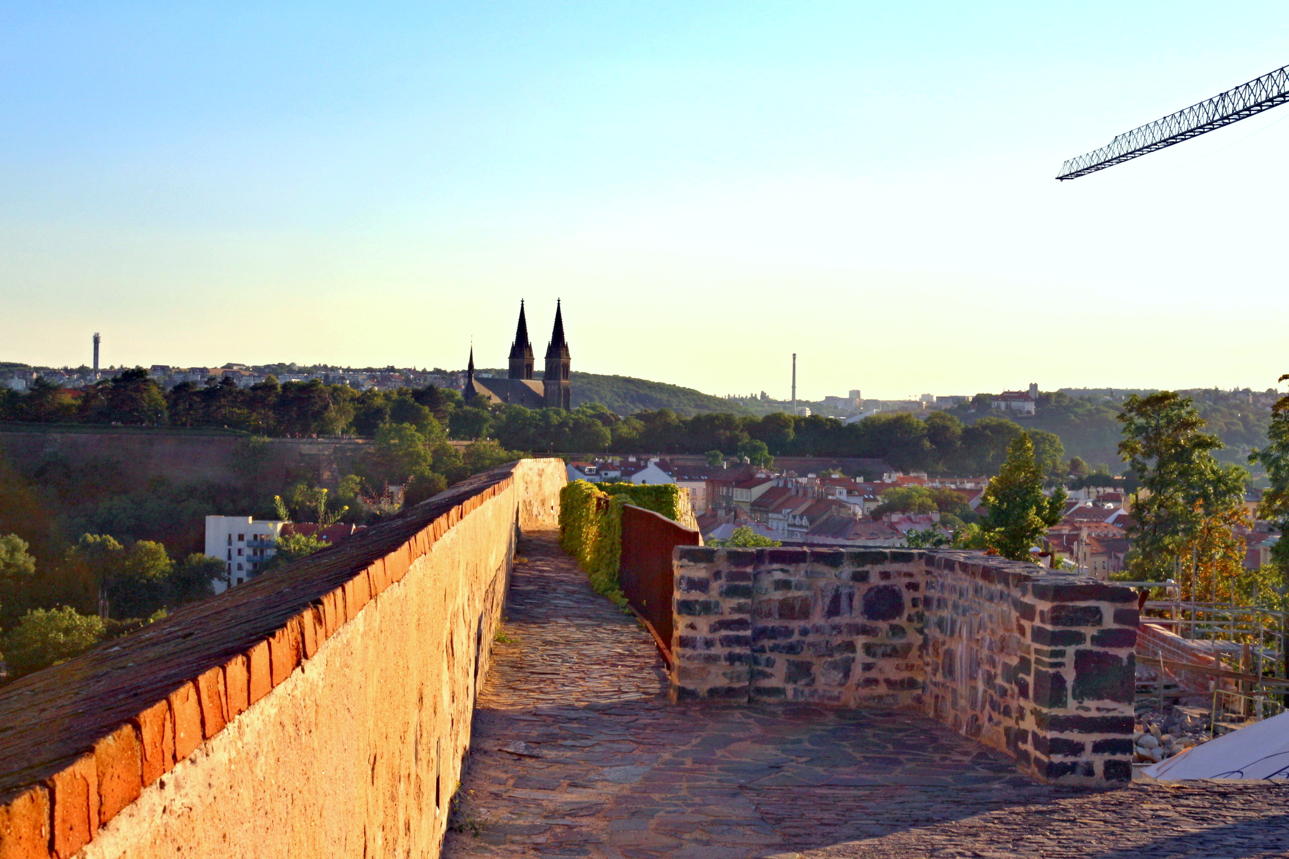 Bastion u Božích muk